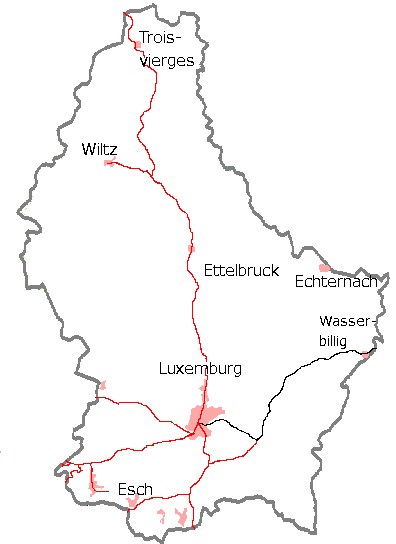 Linia nr 30 w Luksemburgu